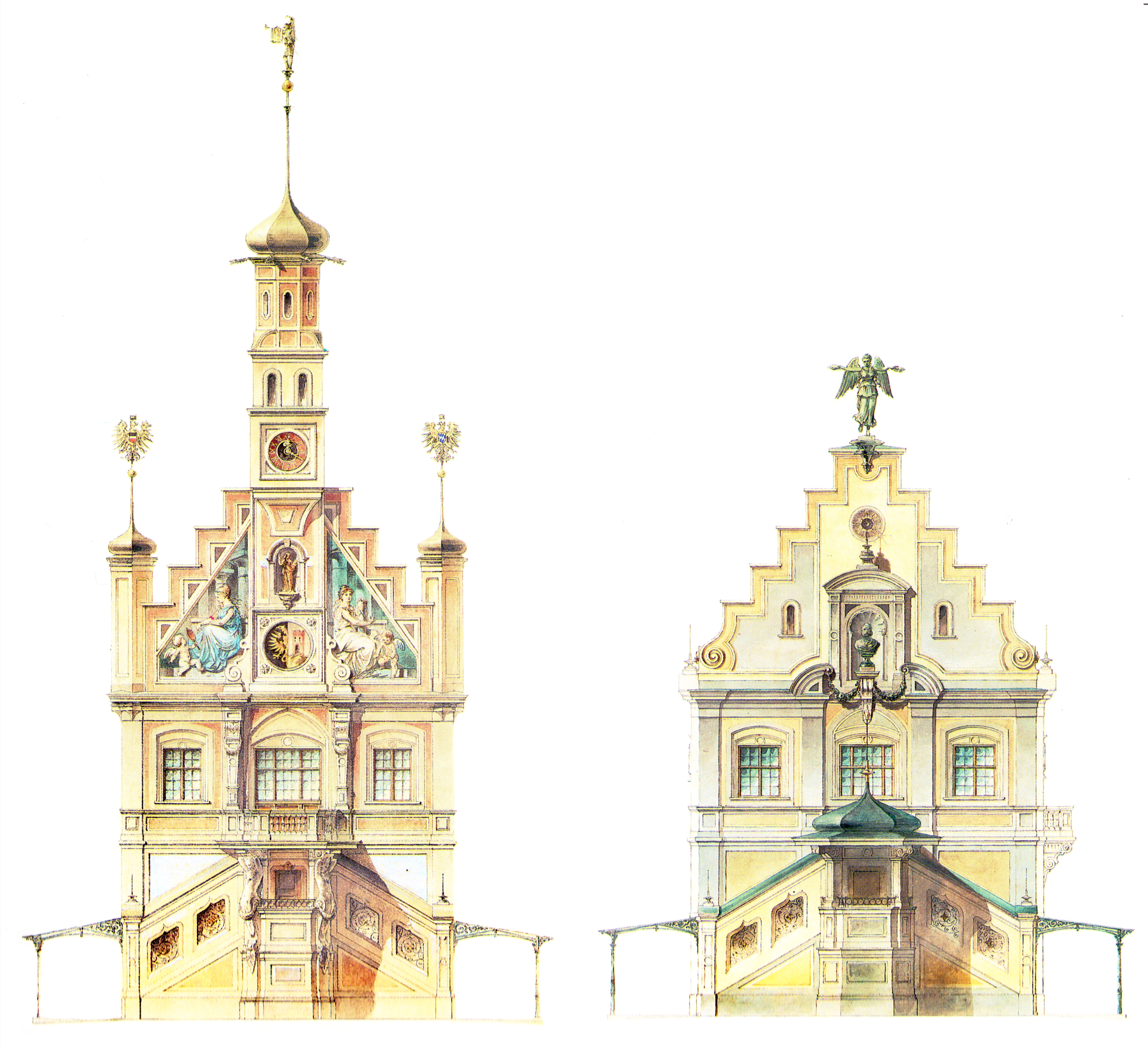 Entwurf von Ludwig von Kramer (gestorben 1905) zur Umgestaltung des Rathauses in Kempten.